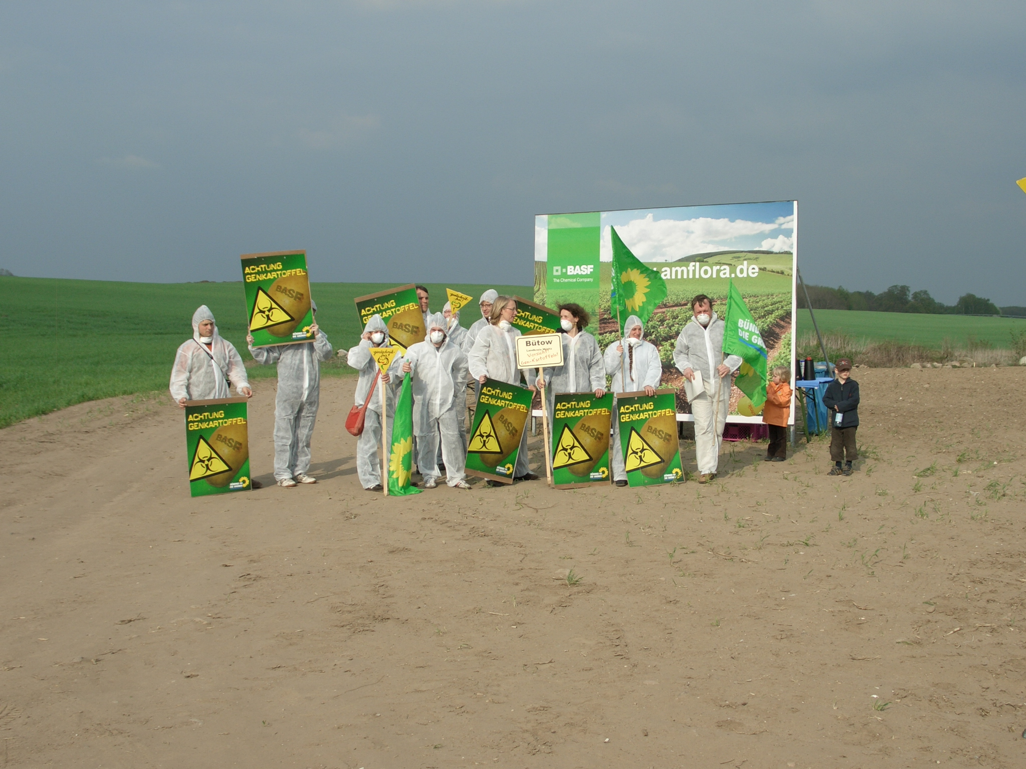 Ende April demonstrierten Gegner der Amflora am Feld in Mecklenburg-Vorpommern.